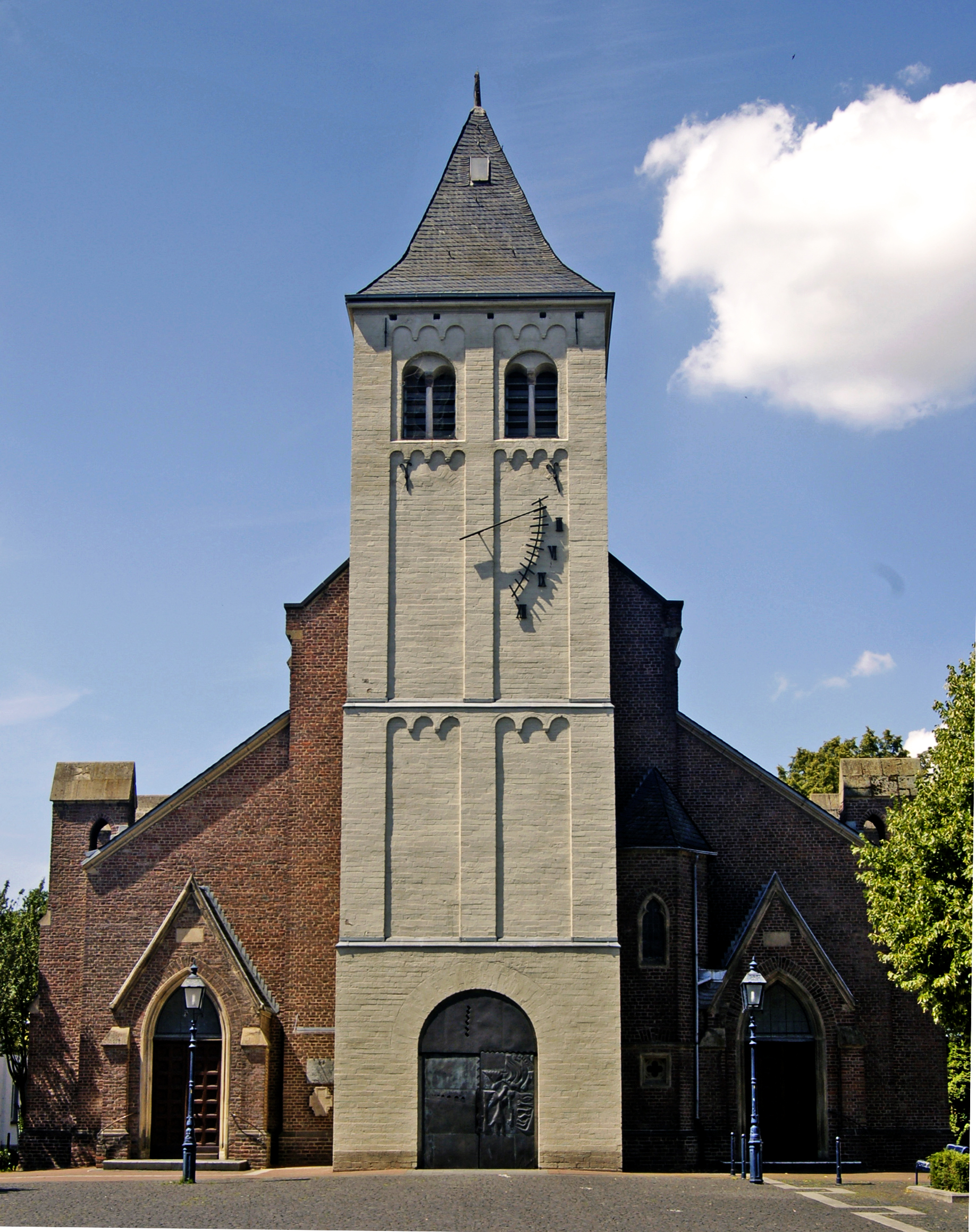 Pfarrkirche St. Nikolaus im Ortsteil Osterath (Stadt Meerbusch)